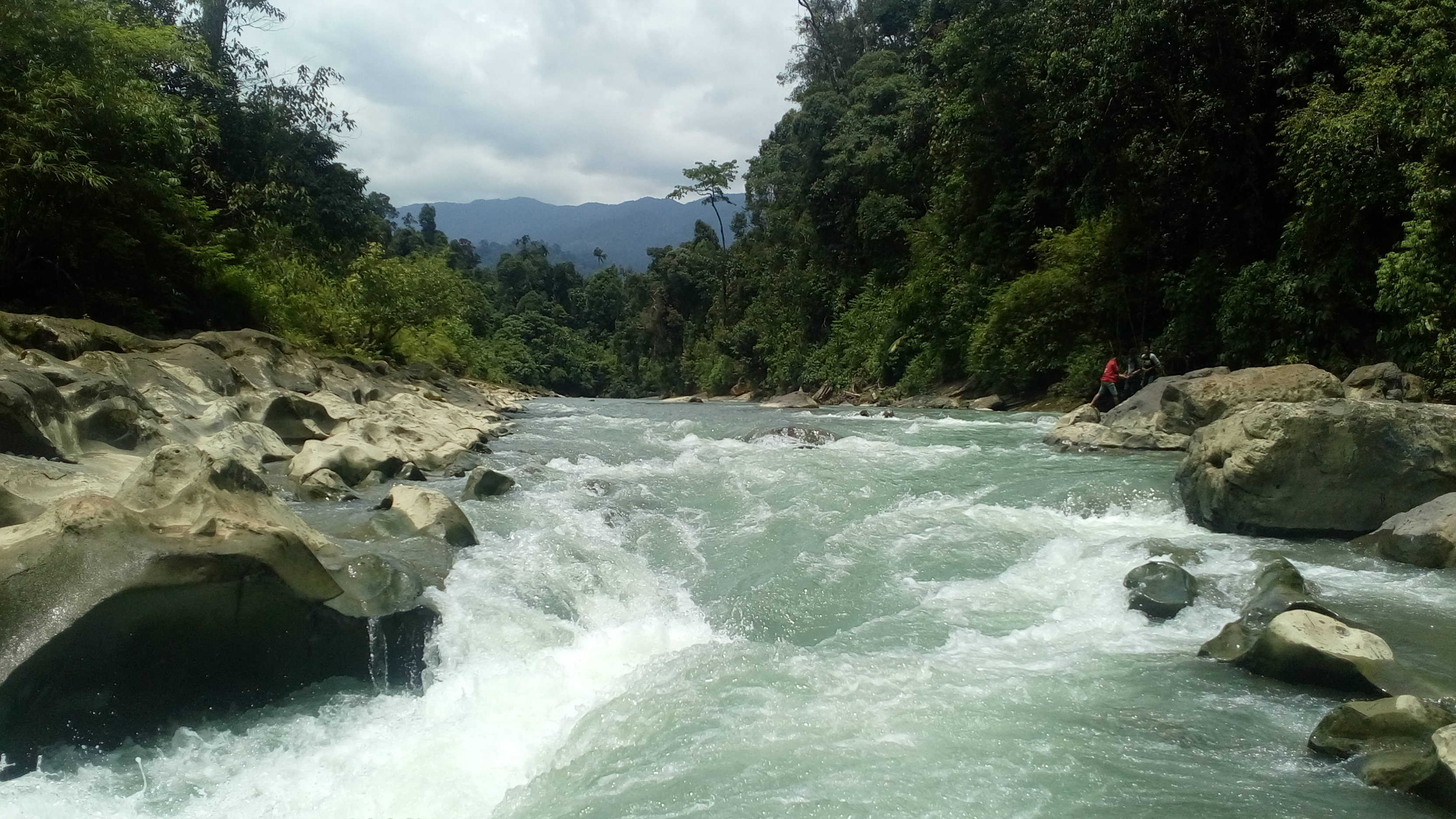 Pemandangan indah di Kuala Paret, terletak di TNGL, Aceh Tamiang. Air yang cukup deras dengan pemandangan alam dan pegunungan nan indah. Lokasi yang cukup sulit dijangkau, namun tetap terjaga kelestariannya.